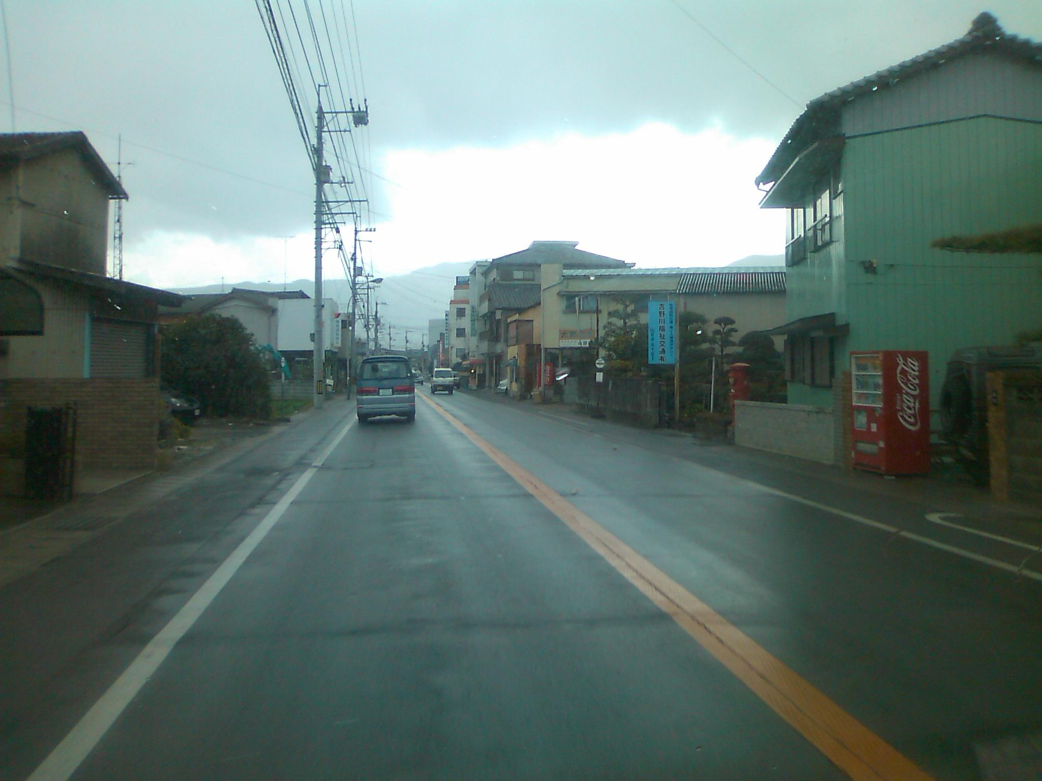 阿波中央橋南